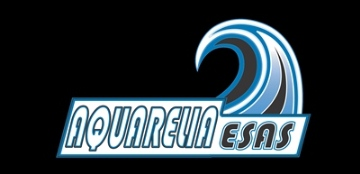 Logótipo do projecto "Aquarélia"